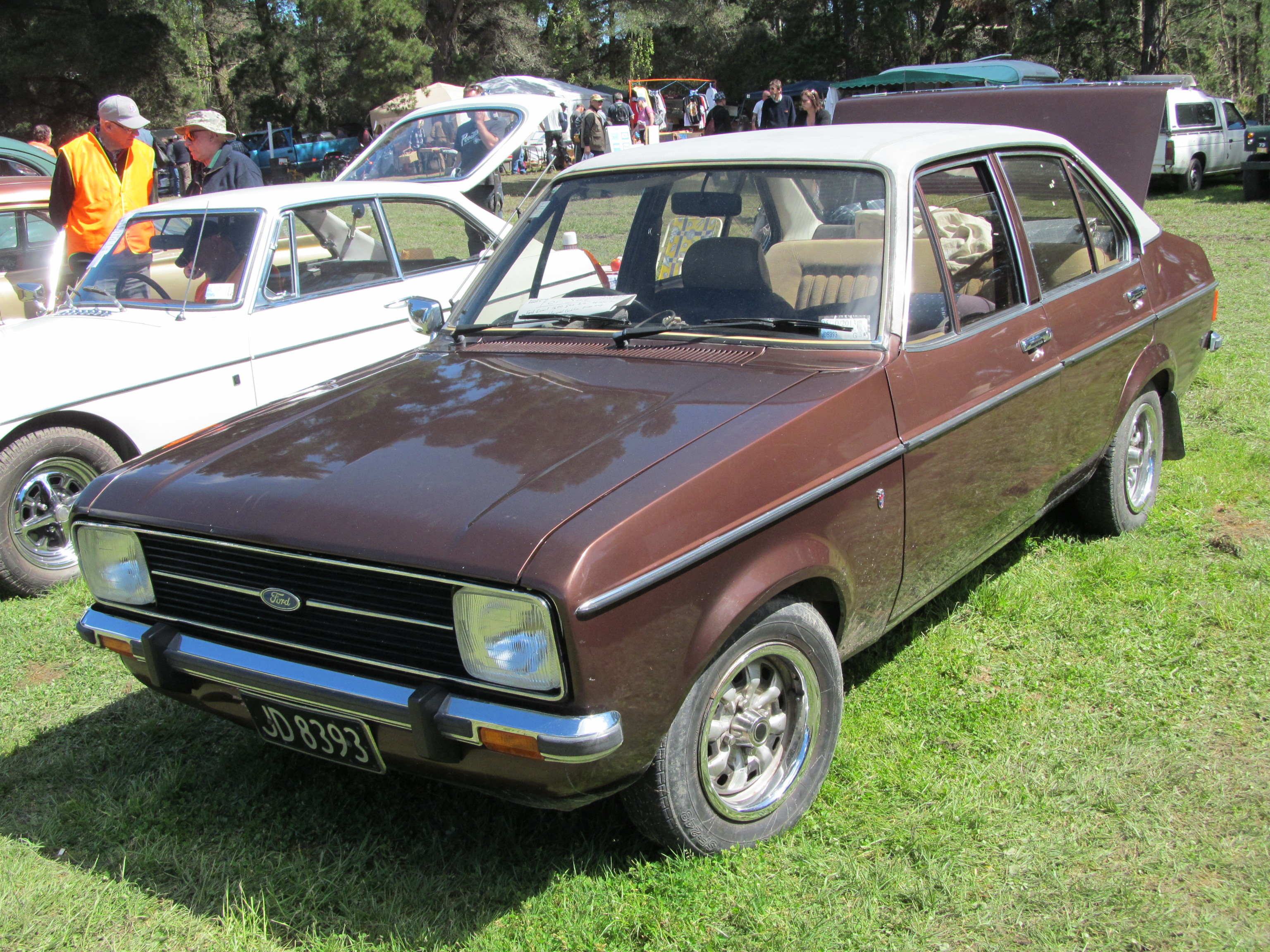 1979 Ford Escort Ghia